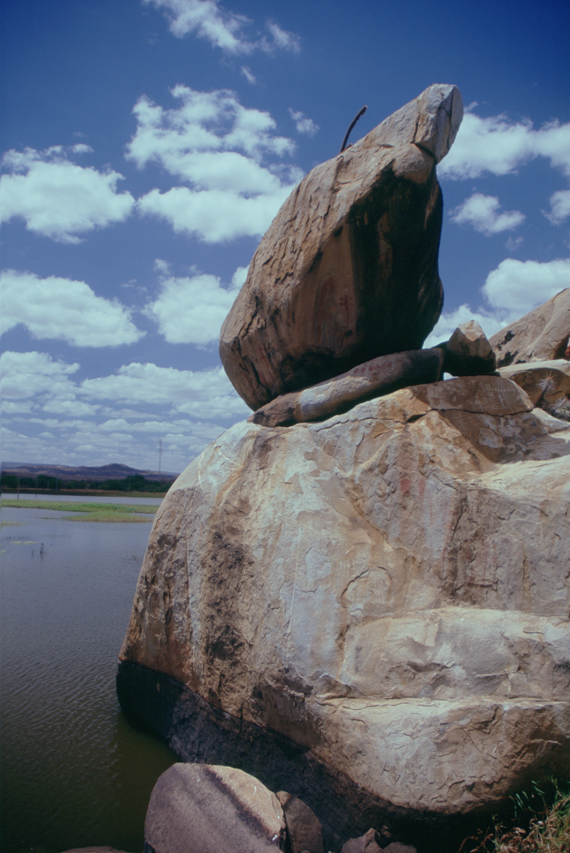 Pedra com pintura rupestre no Municipio de Santana do Matos, RN, Brasil. Massis, Nov/2006,public domain.